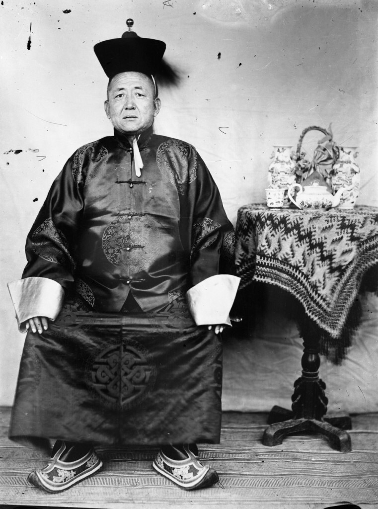 Монгол: Жонон ван Ширнэндамдин. Эх сурвалж: (ШУА-ийн Түүх, археологийн хүрээлэнгийн Түүхийн баримт мэдээллийн төв)